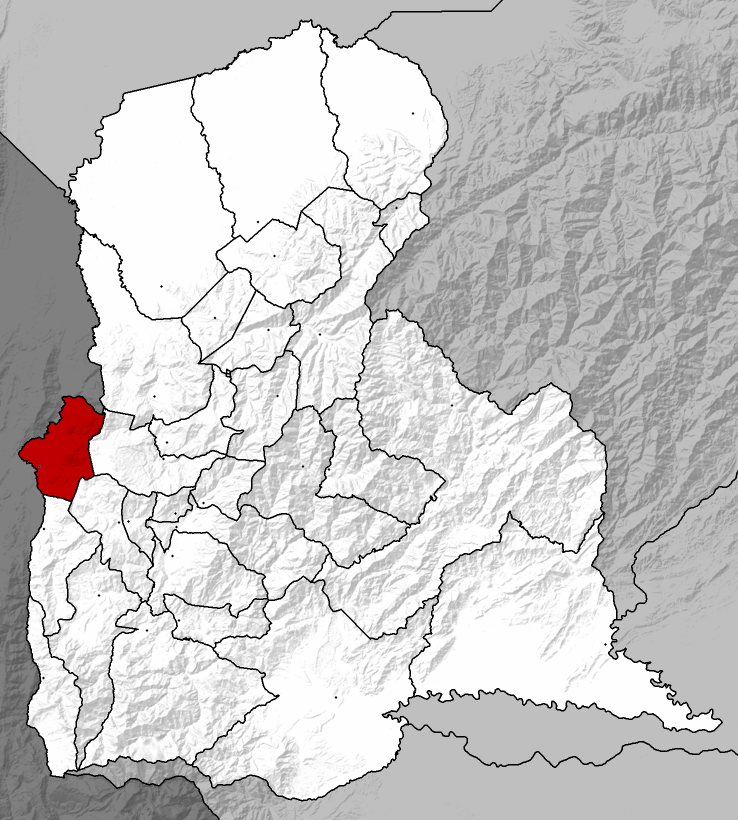 Municipio Pedro María Ureña - Táchira